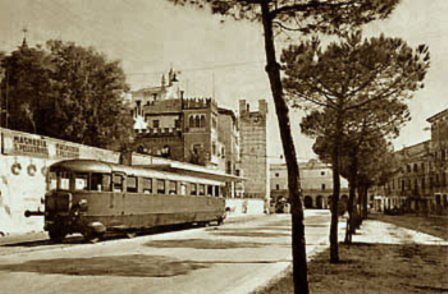 Automotrice FS ALn 56 a Lonigo Città